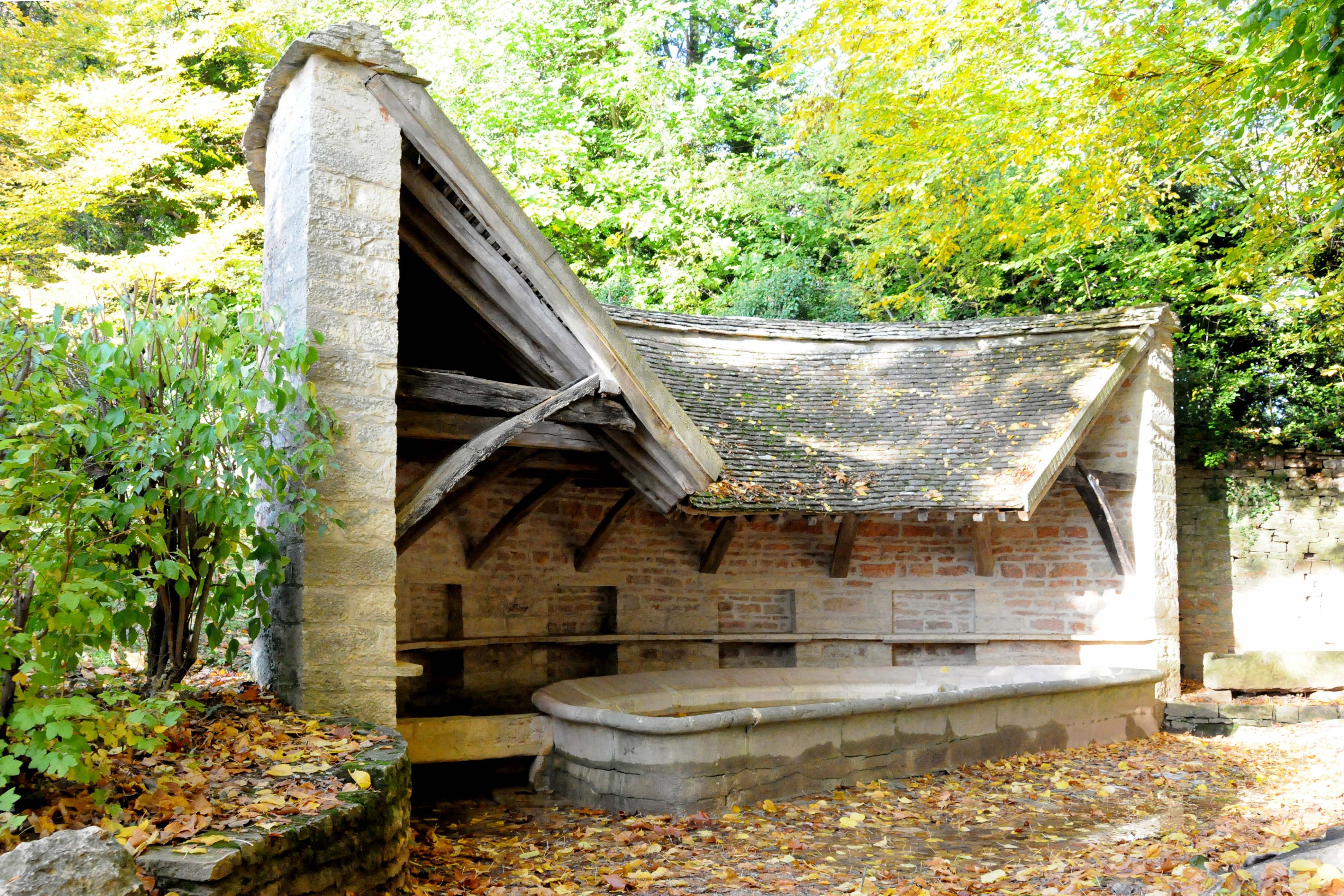 Lavoir à impluvium Cortiamble